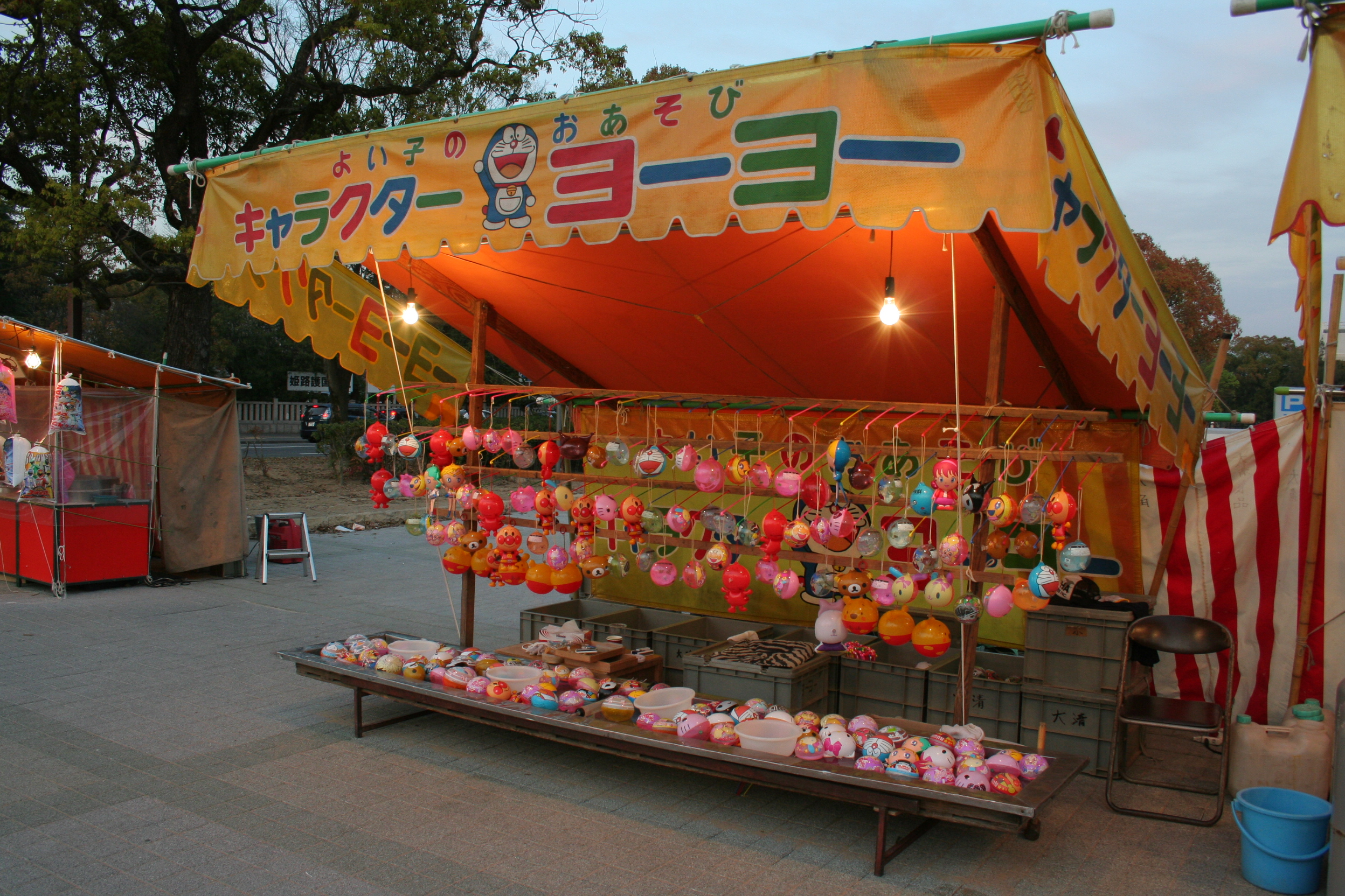 日本の飲食物などを提供する屋台。 ヨーヨーの屋台。